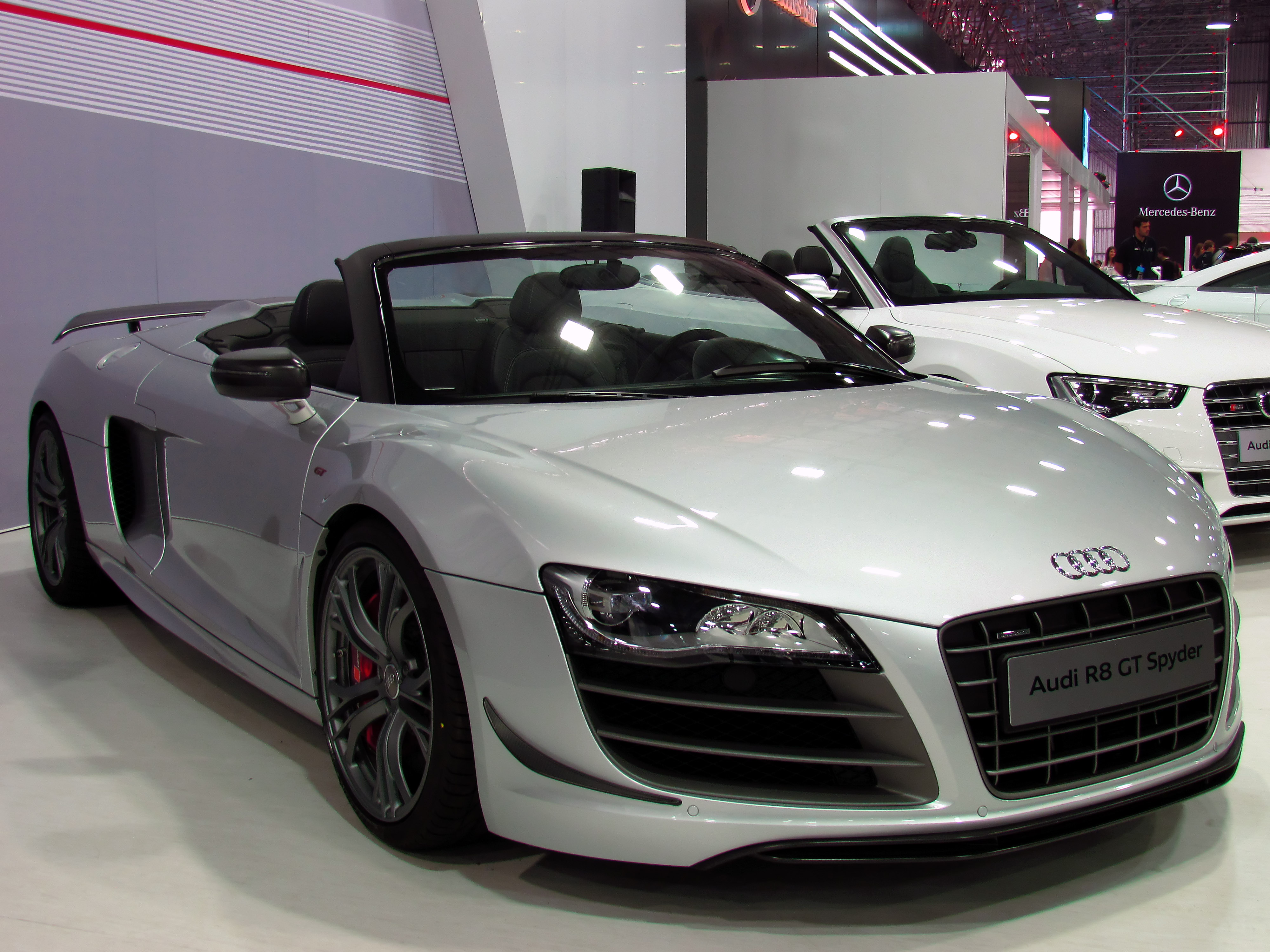 Audi R8 GT Spyder 2013